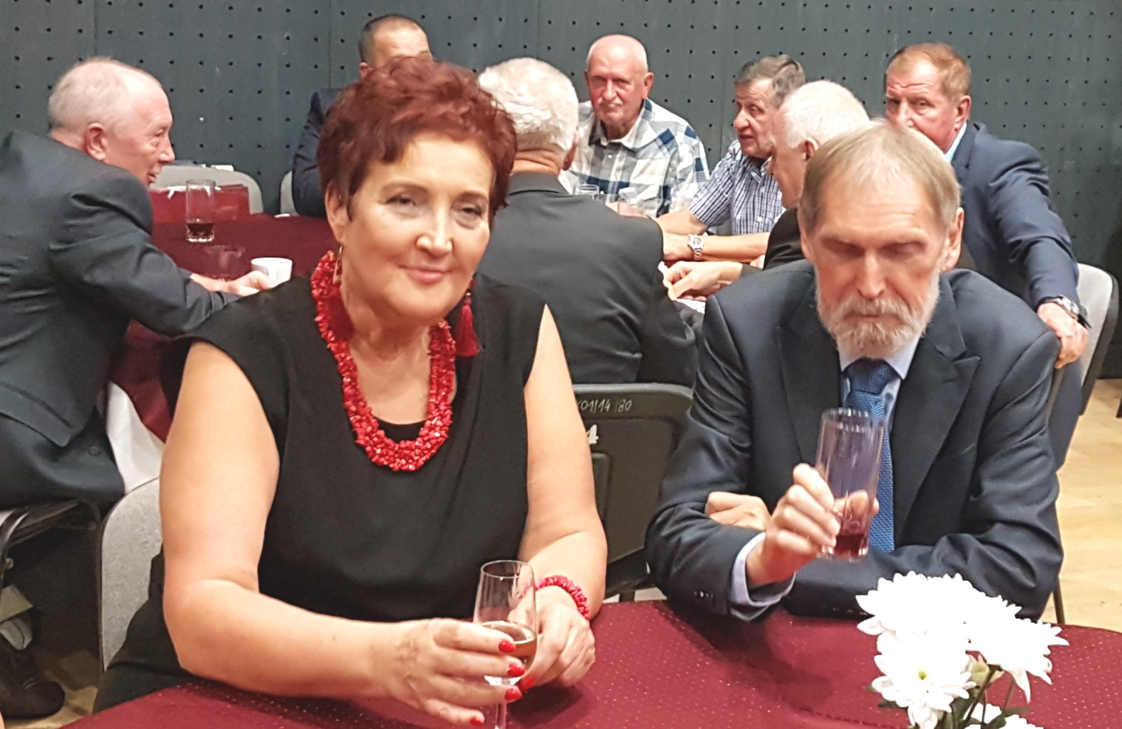 70-lecie. Gala